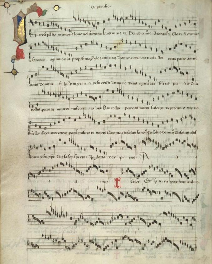 Modena BE α. 5,25